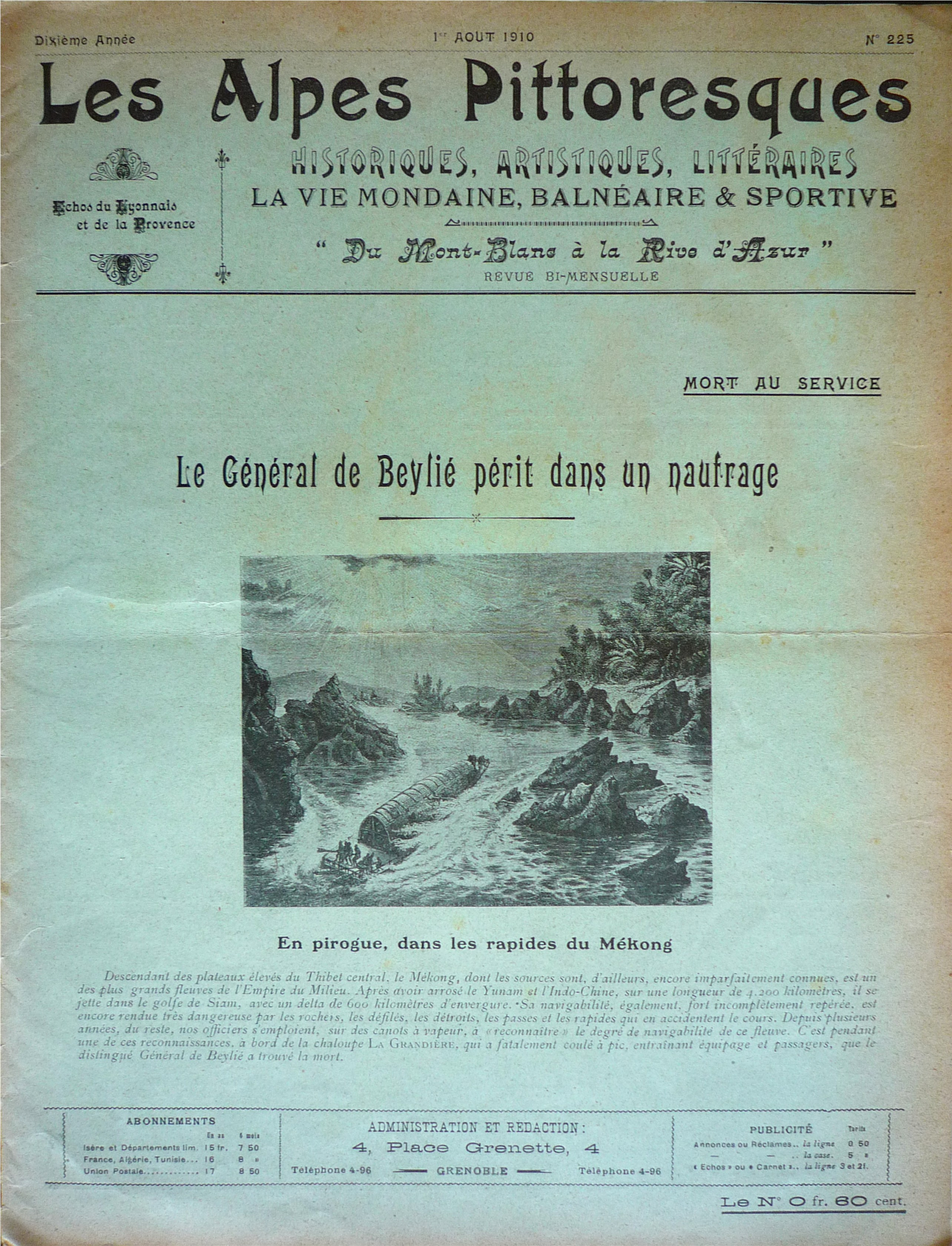 La revue bi-mensuelle Les Alpes Pittoresques du 1er août 1910 relatant le naufrage de la cannonière La Grandière sur le mékong en Indochine française. Le général Léon de Beylié y trouve la mort, ainsi que le médecin major Vincent Ruffiandis et deux autres matelots.